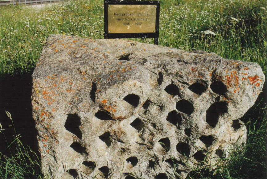 Bohrproben vom Bau des Albulatunnels am bahnhistorischen Lehrpfad bei Preda, 22. Juni 2003.